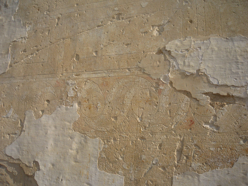 Muro esgrafiado de la Casa de Arizón en Sanlúcar de Barrameda